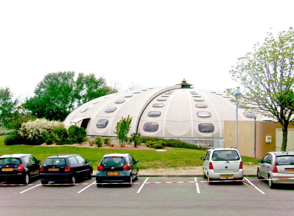 Piscine municipale de Granville (Manche, Basse-Normandie, France).